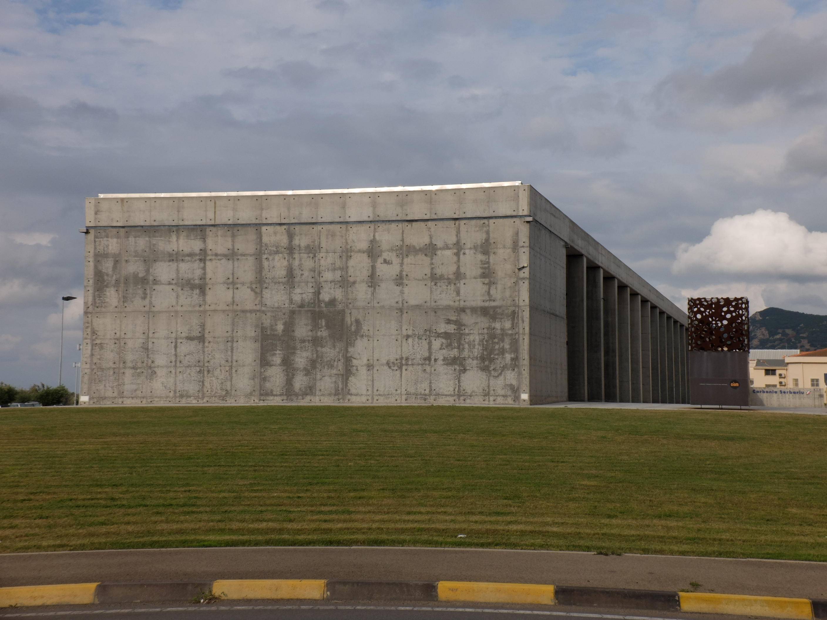 Statione Carbonia Serbariu